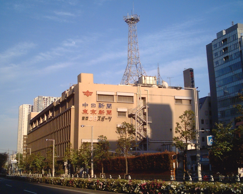 Chunichi_Shimbun_Japanese daily newspaper Sinagawa Building